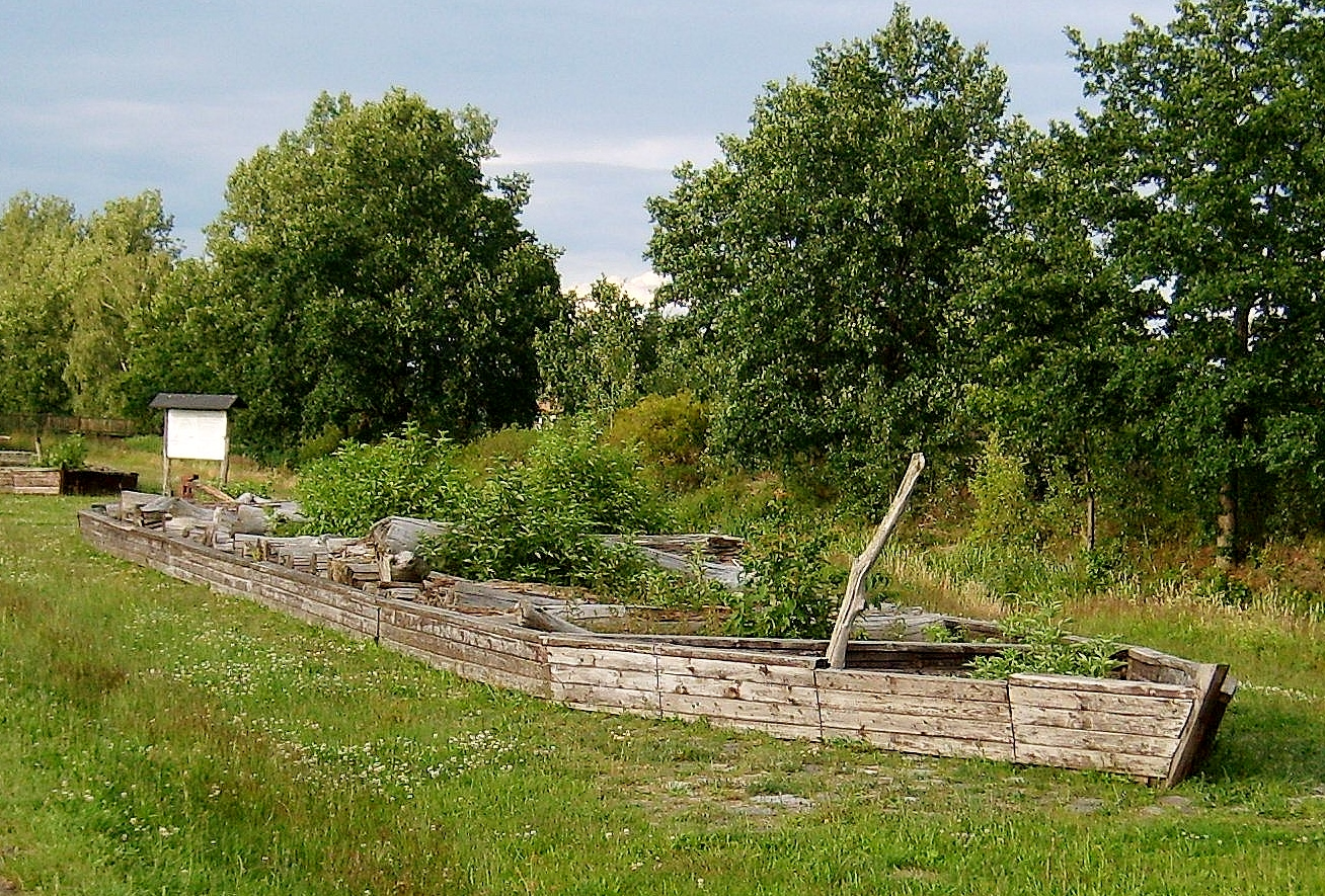 Kanal-Boote bei Prösen